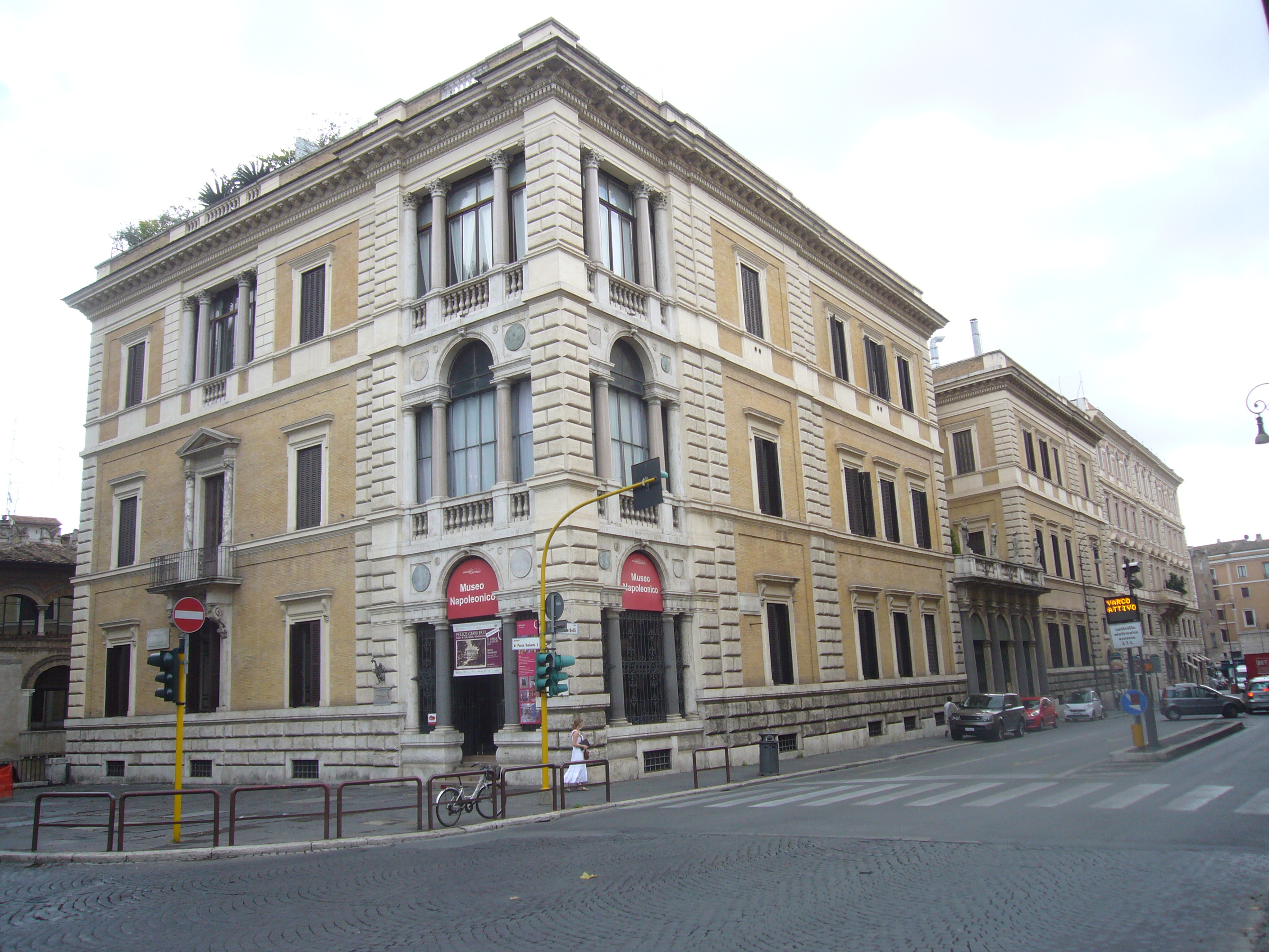 Roma, Palazzo Primoli, Museo napoleonico e Museo Mario Praz.